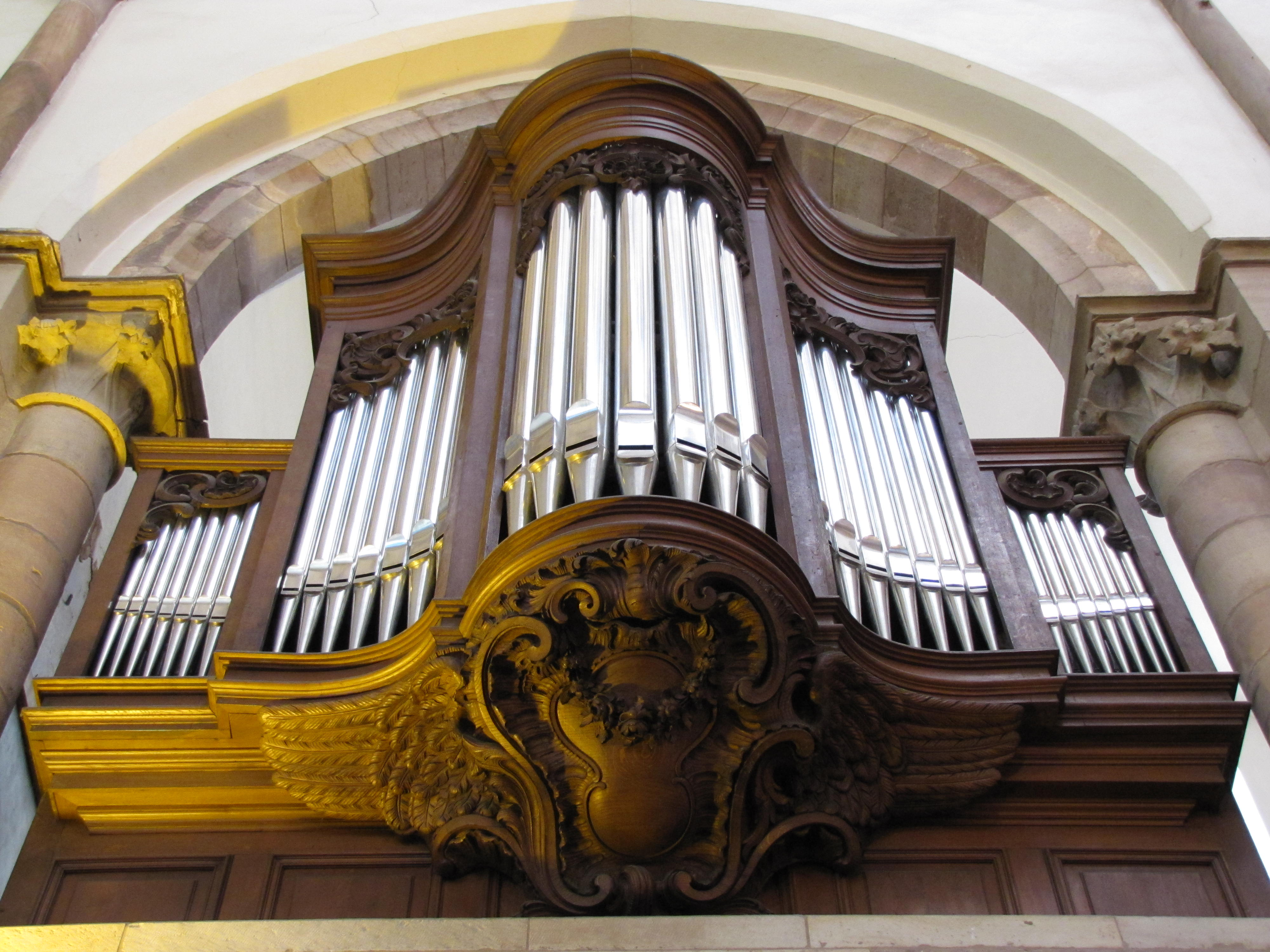 Alsace, Bas-Rhin, Église protestante Saint-Thomas de Strasbourg, 4 rue Martin-Luther (PA00085032). Orgue de choeur Dalstein-Haerpfer-Blumenroeder (1905)